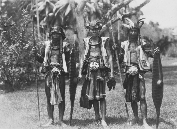 Foto. naam reprofotograaf: Irene de Groot/Paul Romijn datum repro:2001. Portret van een drietal krijgers bij Hilisimaetano